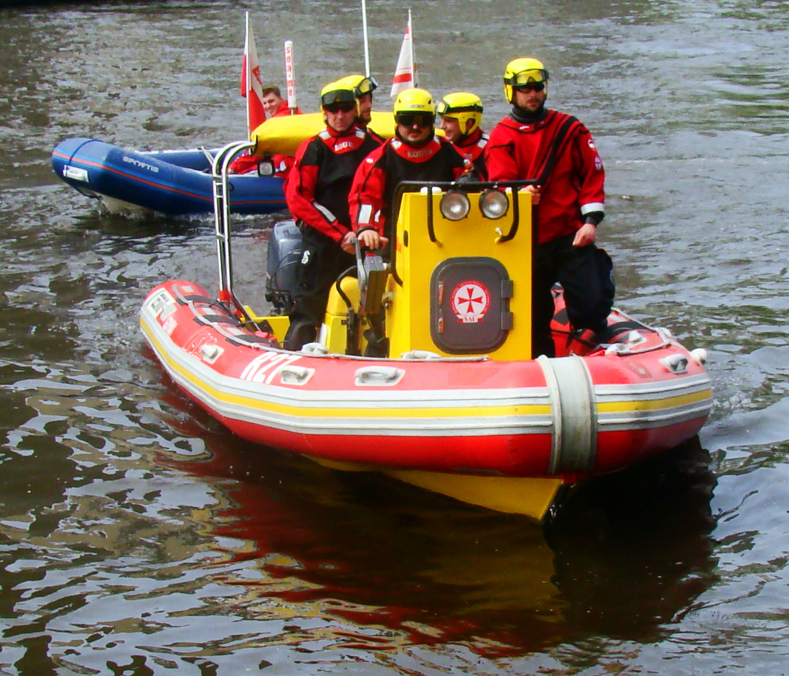 Morska Służba Poszukiwania i Ratownictwa na Parsęcie w Kołobrzegu.